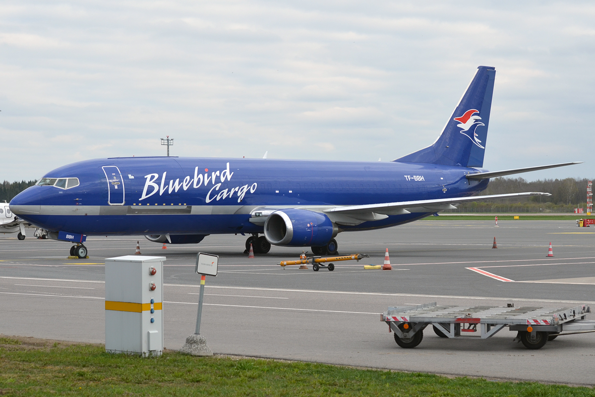 Bluebird Cargo, TF-BBH, Boeing 737-4Y0 SF